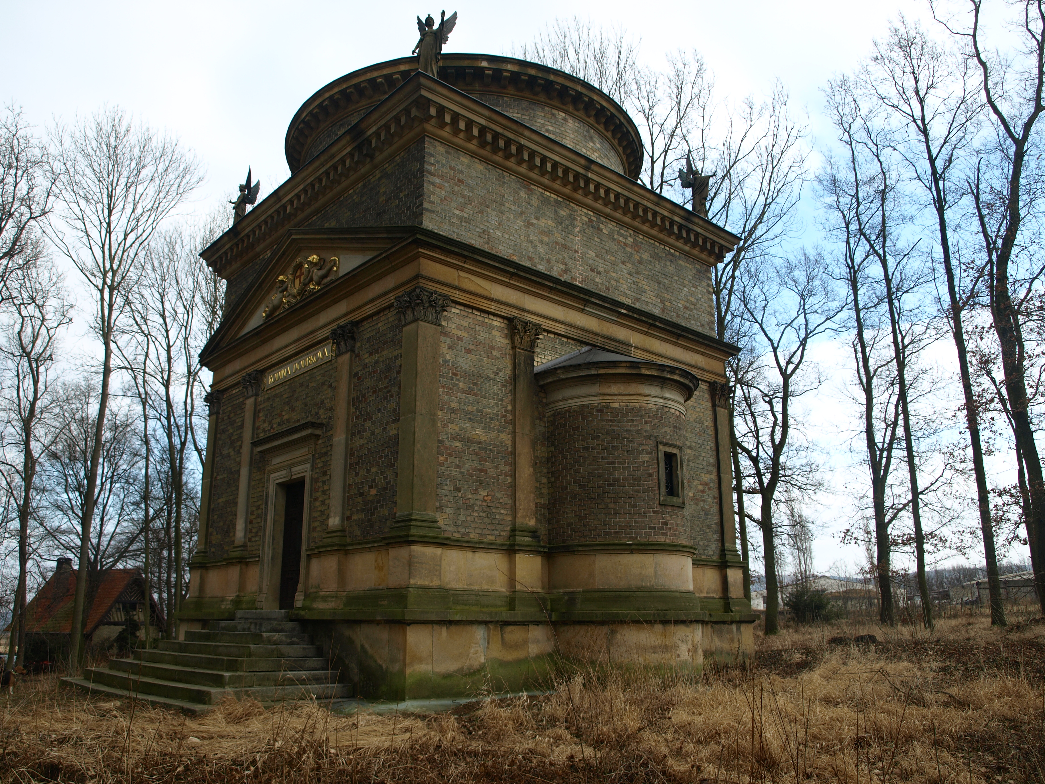 Pohřební kaple – hrobka rodiny Daubkovy, Liteň